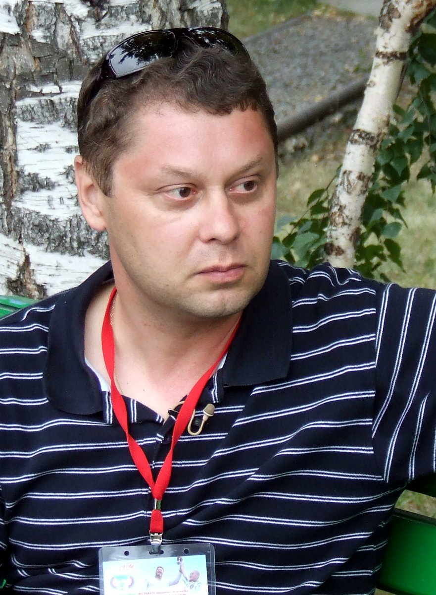 Сергей Каргашин. Всероссийский фестиваль культуры и спорта имени Михаила Евдокимова. Интервью Светлане Скаредовой 03.08.2008 года в пос. Верх-Обский Смоленского района Алтайского края Российской Федерации.